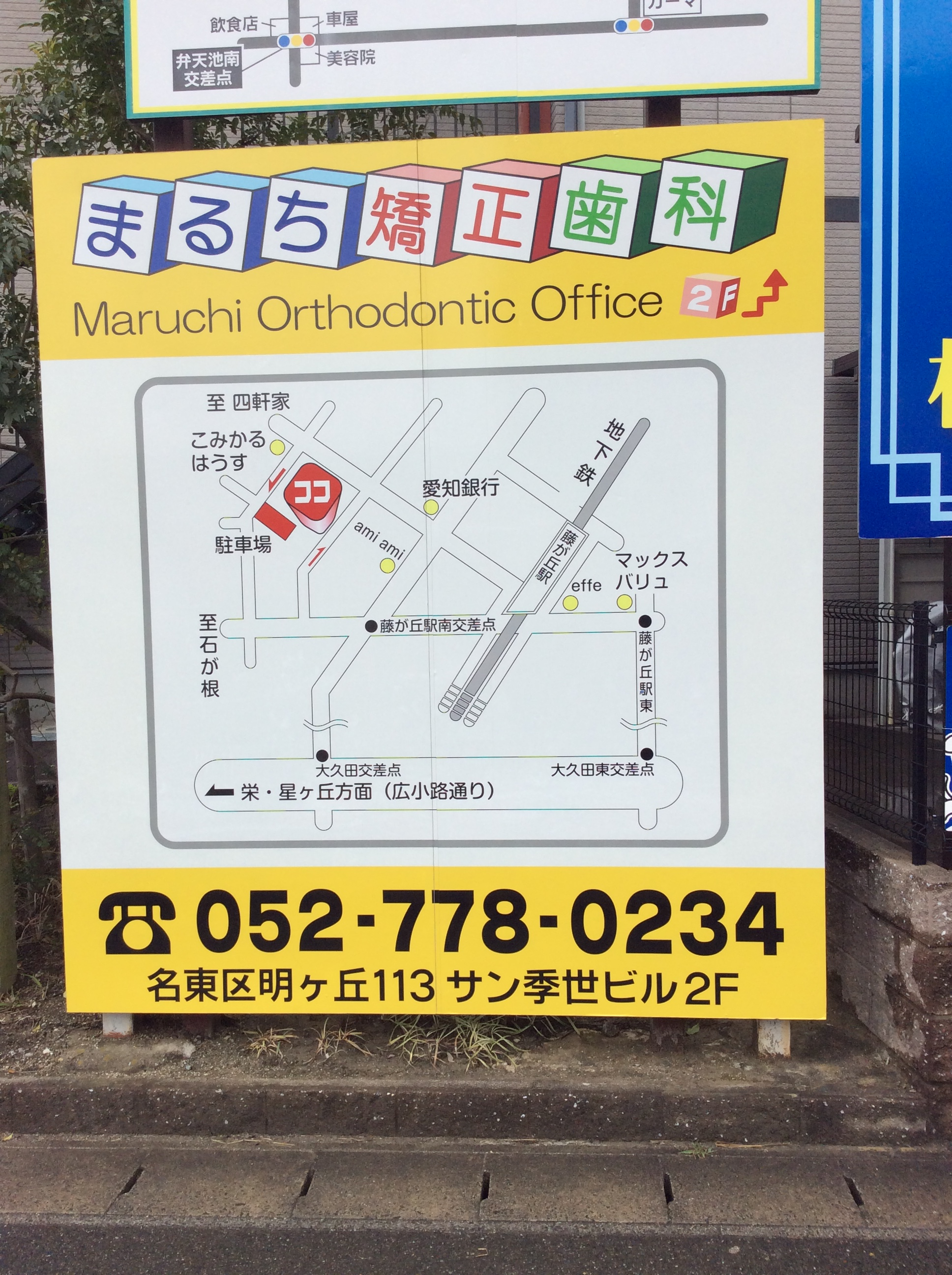 名東区の某歯科の広告。東山通（グリーンロード）のことを広小路通と書いてある。